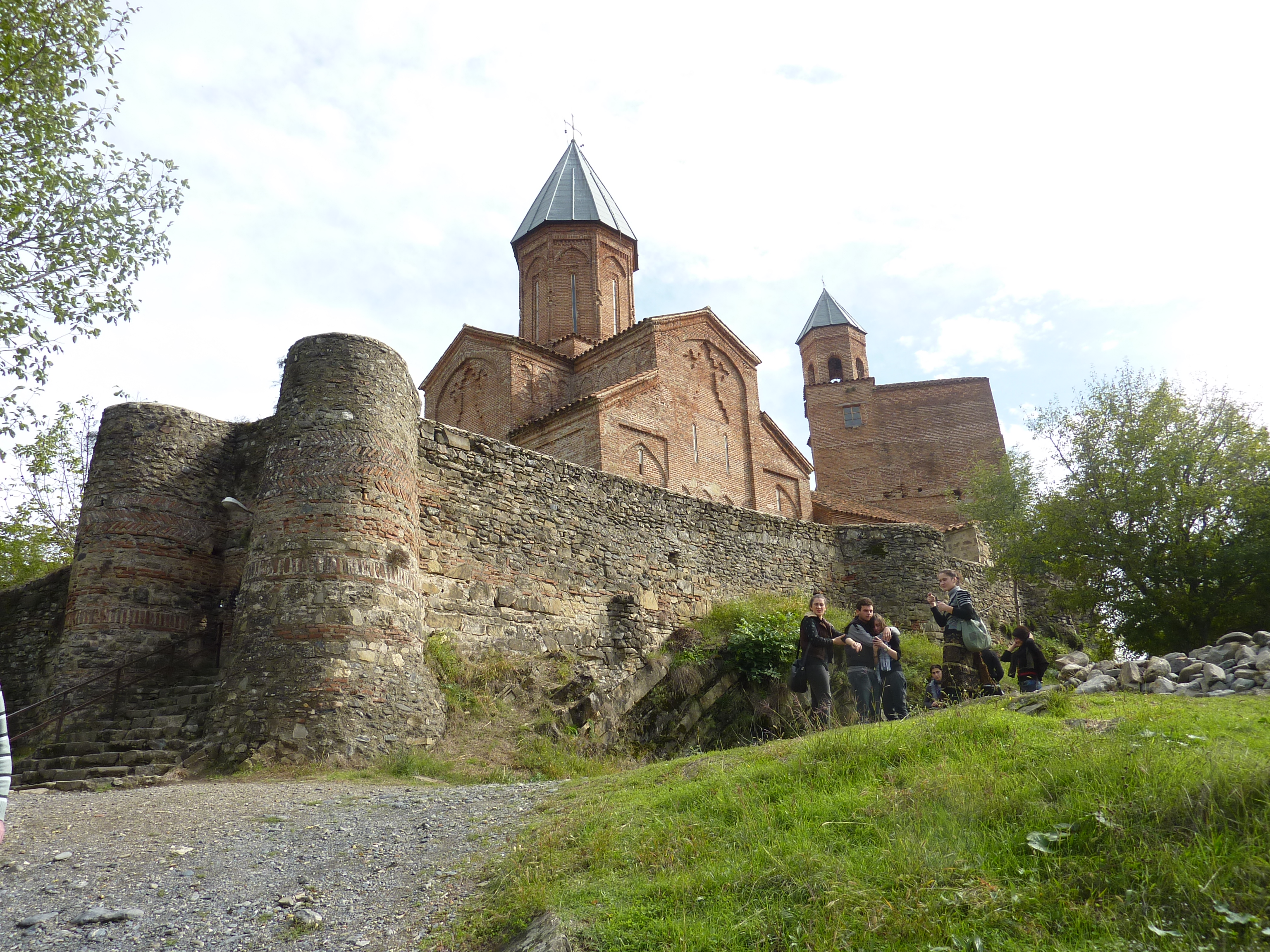 L'église fortifiée de Grémi (1565)